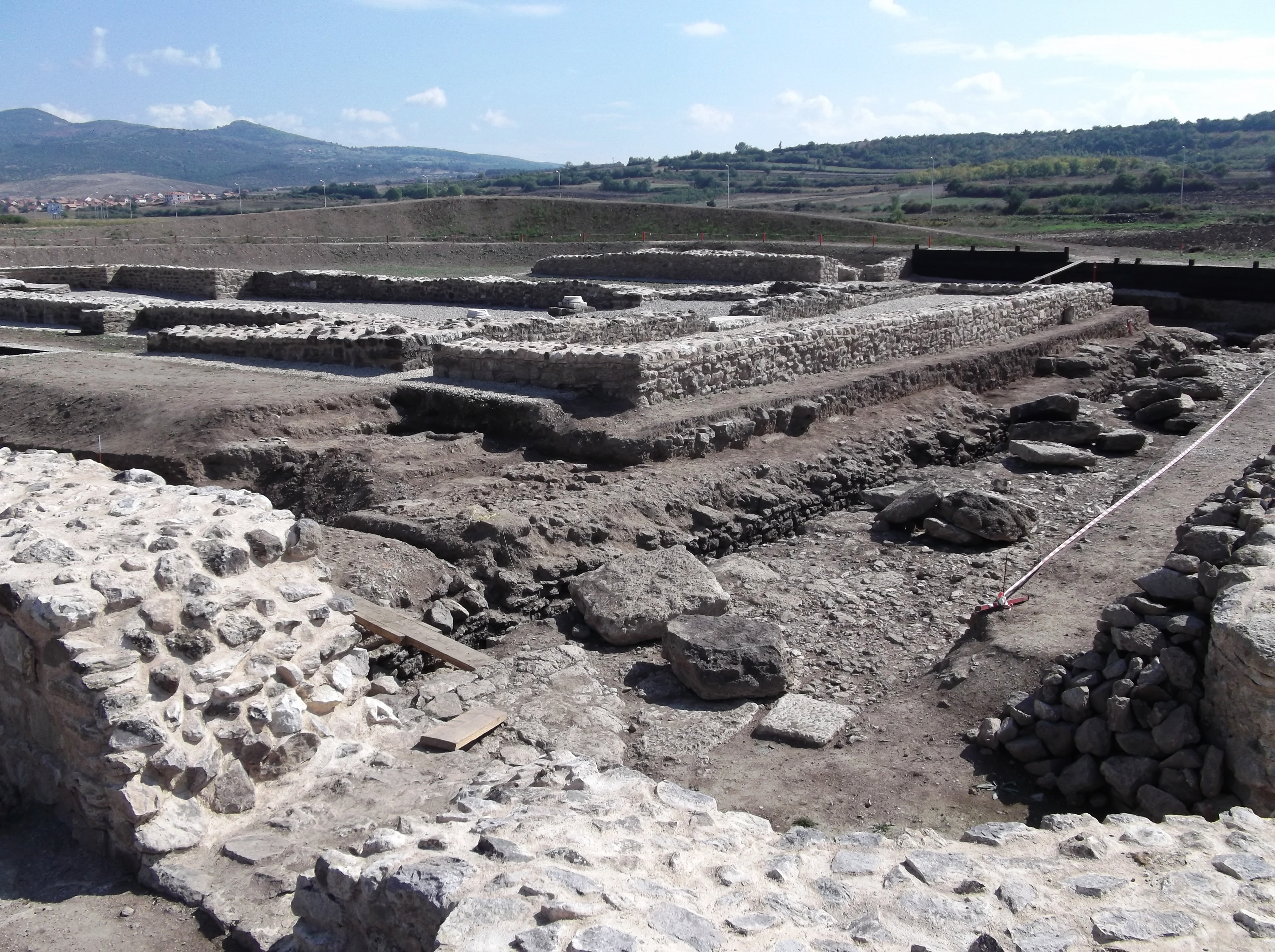 ULPIANA-lokaliteti arkeologjik